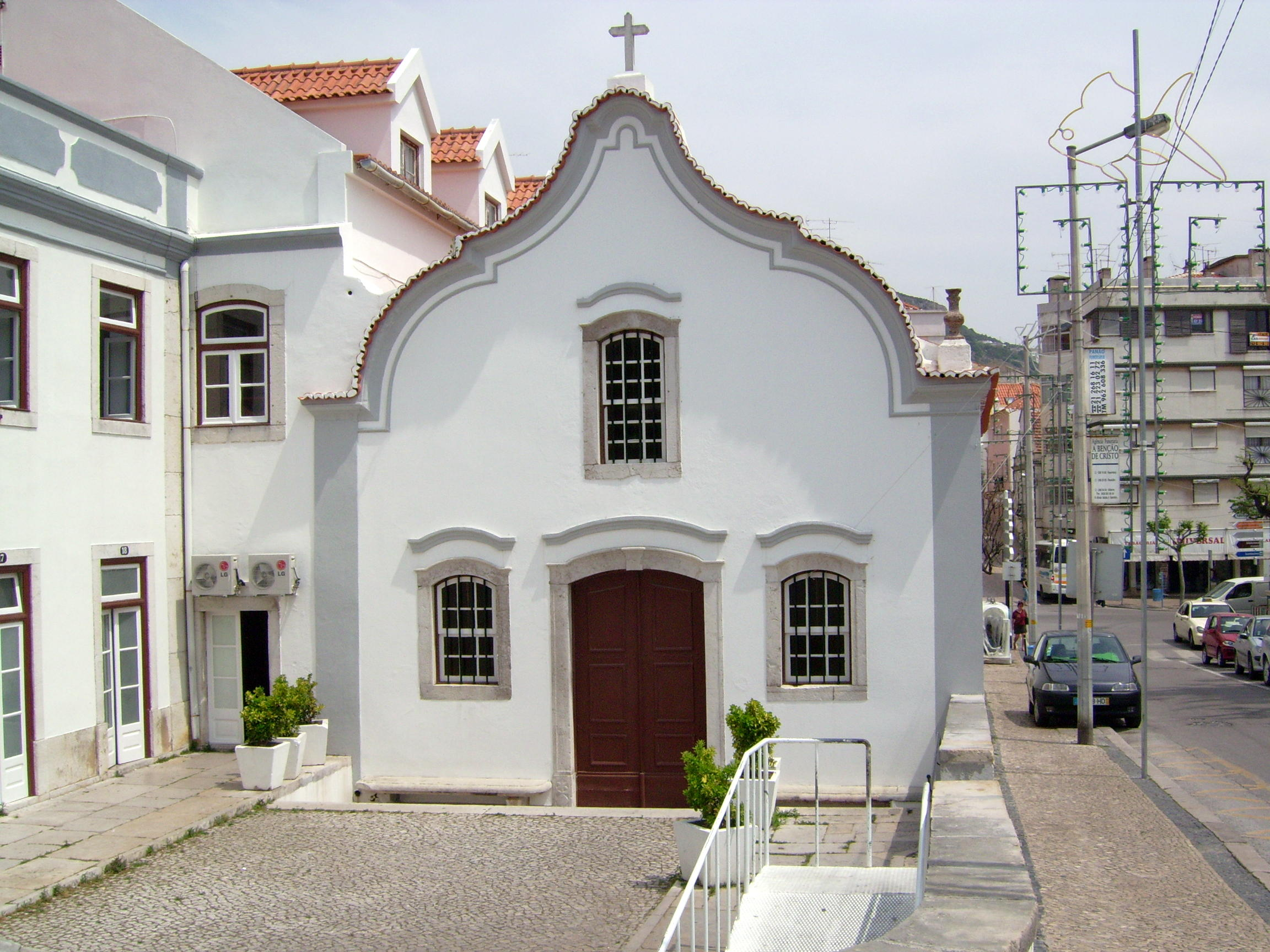 Capela da Santa Casa da Misericórdia de Sesimbra Local: Sesimbra - Portugal user:sacavem (pt) (usuário:sacavem)